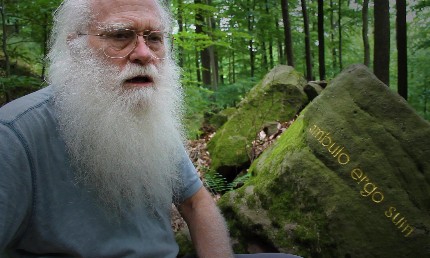 Herman de Vries bij een van zijn werken in het Steigerwald in Unterfranken, Duitsland